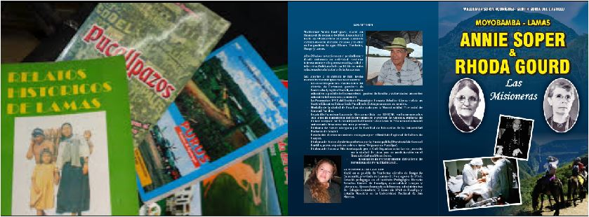 Publicaciones de Waldemar Soria Rodríguez 1992 - 2018